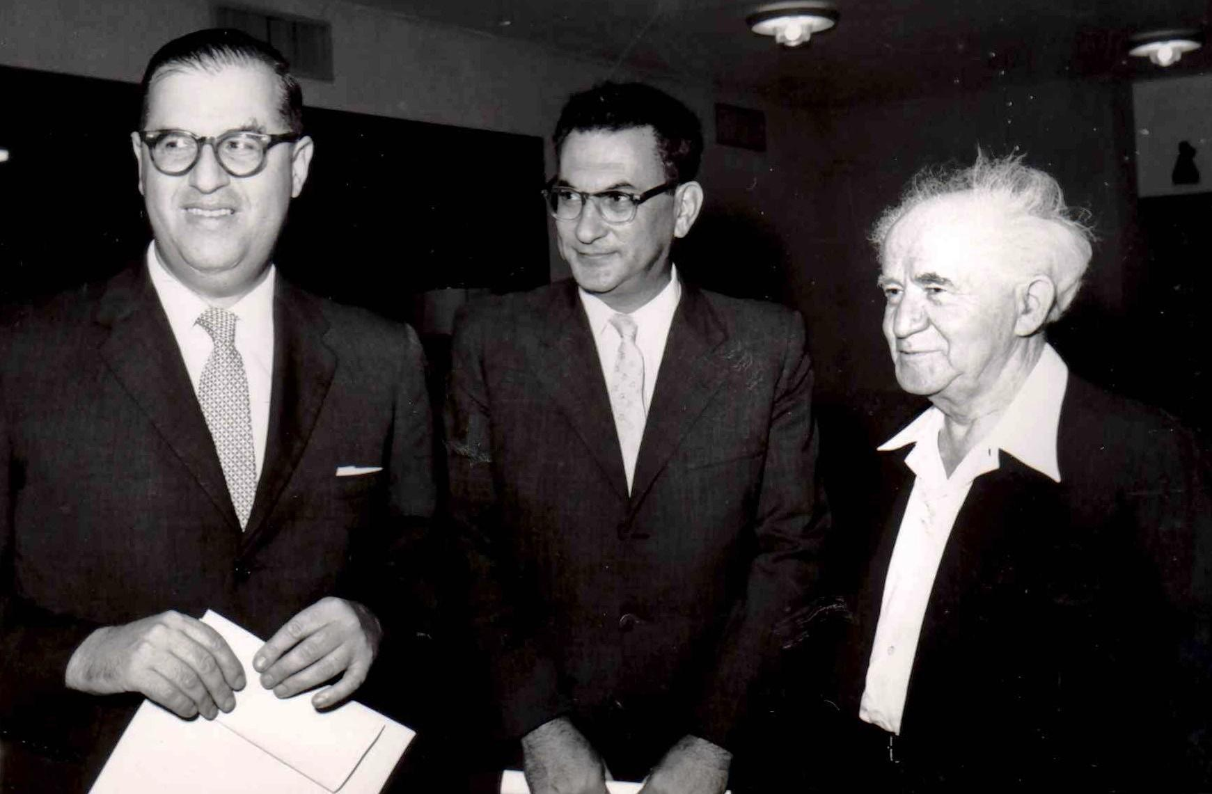 ביקור ראש הממשלה דוד בן גוריון ברחובות. בתמונה עם יצחק כץ, ראש העירייה ועם אבא אבן. יצחק כץ היה ראש עיריית רחובות בין השנים 1955-1968.